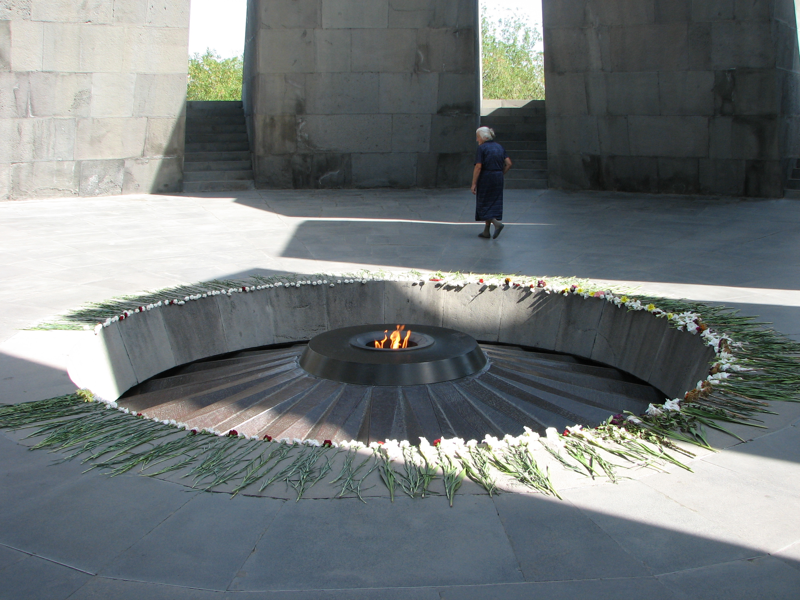 Armenian Genocide Museum-Institute in Yerevan, Armenia המוזיאון לרצח העם הארמני בירוואן בירת ארמניה